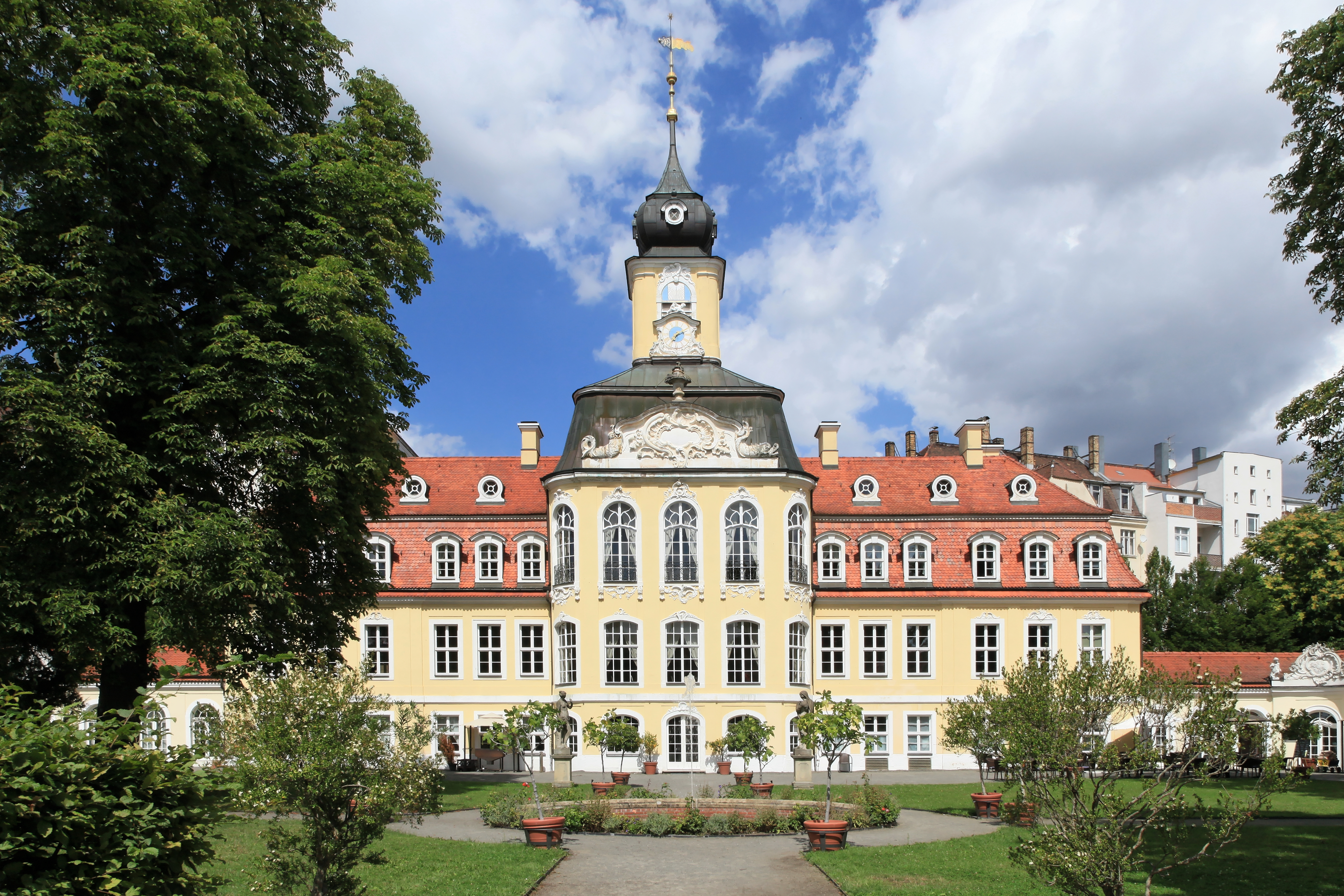 Gohliser Schlösschen im Gohliser Schlosspark, Poetenweg in Leipzig